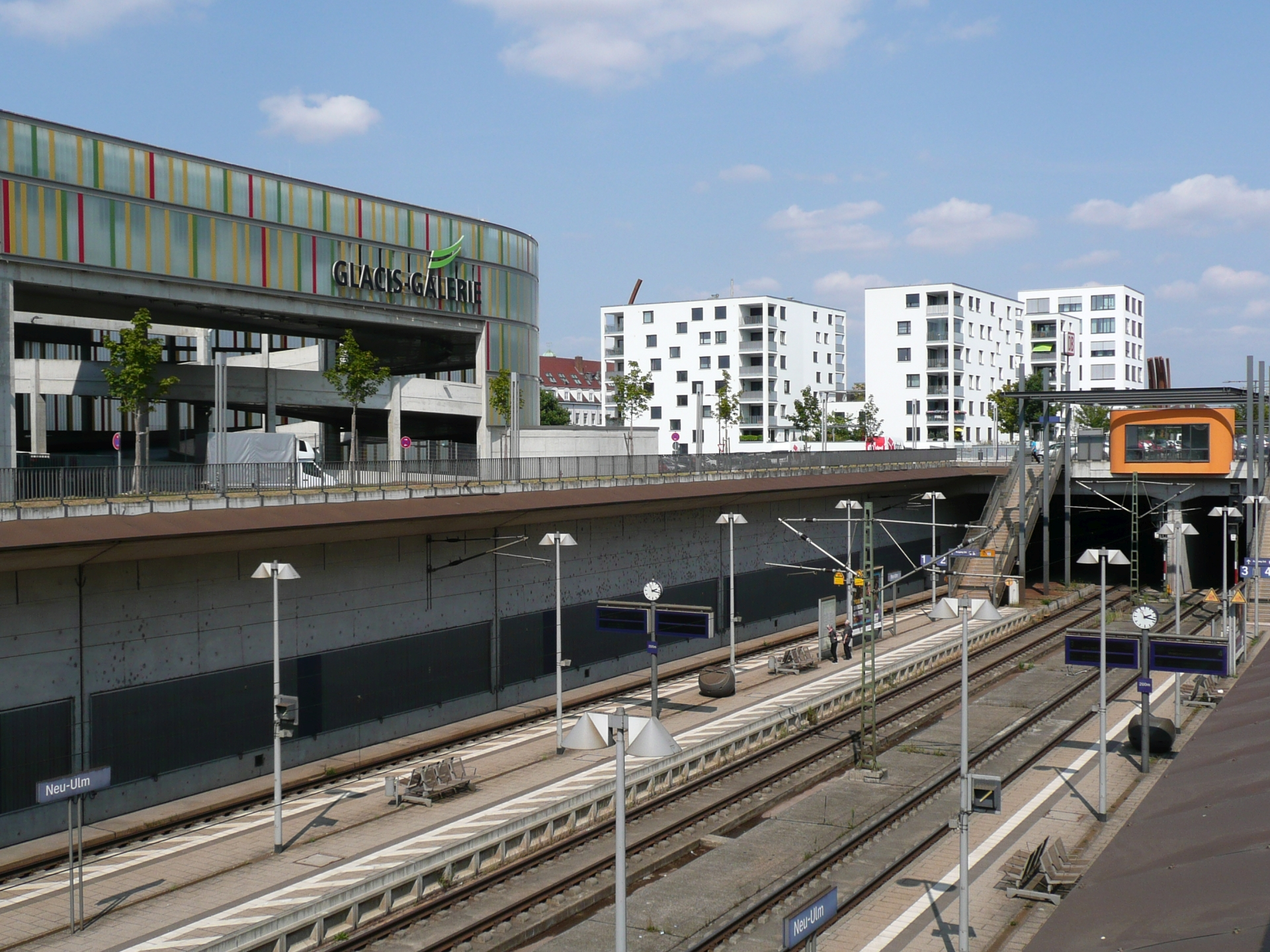 Quartier Wohnen am Kunstpark am Bahnhof Neu-Ulm